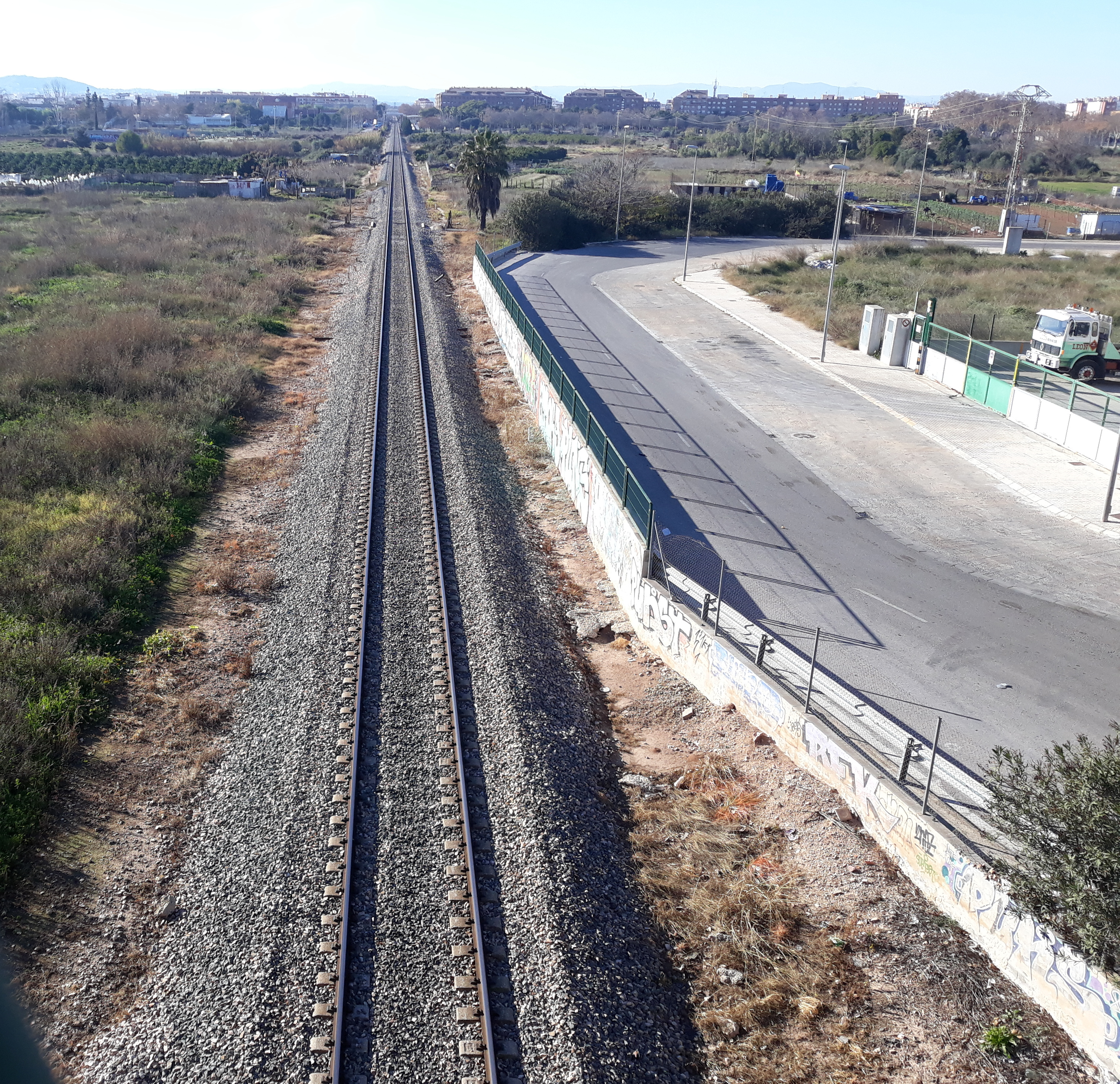 Línia de Rodalía C-3 al seu pas per Aldaia